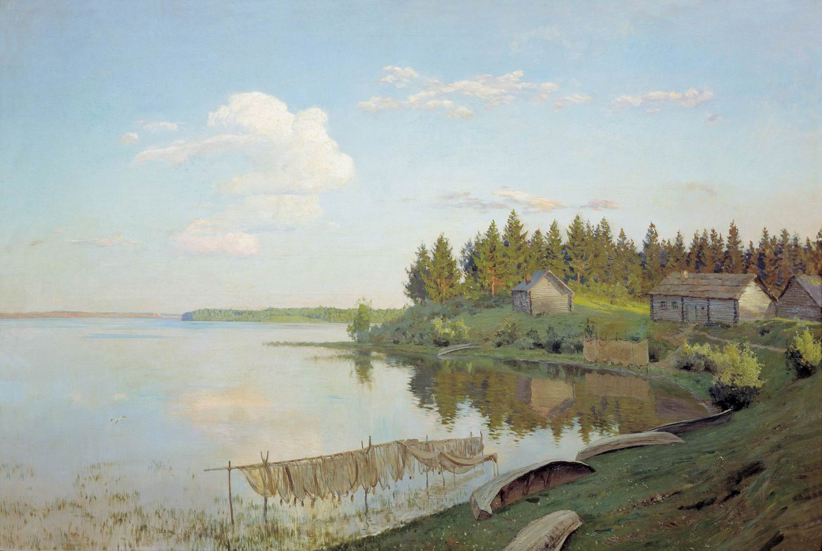 На озере (Тверская губерния)